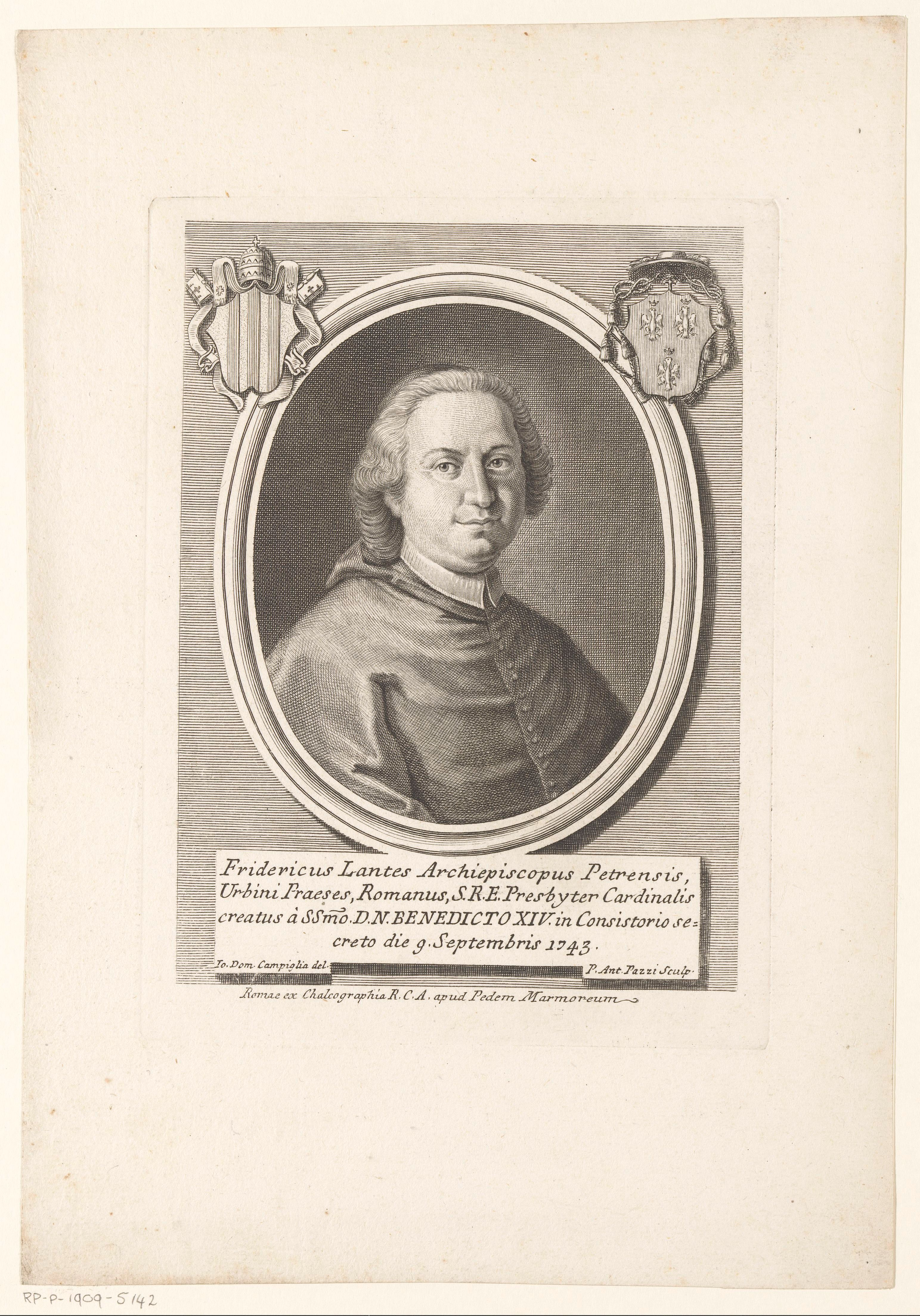 IdentificatieTitel(s): Portret van kardinaal Federico Marcello LantePortretten van kardinalen met twee wapenschilden (serietitel)Effigies (serietitel)Objecttype: prent Objectnummer: RP-P-1909-5142Opschriften / Merken: verzamelaarsmerk, verso, gestempeld: Lugt 2228Omschrijving: Linksboven en rechtsboven een wapenschild.VervaardigingVervaardiger: prentmaker: Antonio Pazzi (vermeld op object)naar tekening van: Giovanni Domenico Campiglia (vermeld op object)uitgever: Calcographia R.C.A. (vermeld op object)Plaats vervaardiging: prentmaker: Italiënaar tekening van: Italiëuitgever: RomeDatering: 1743 - na 1768Fysieke kenmerken: ets en gravureMateriaal: papier Techniek: graveren (drukprocedé) / etsenAfmetingen: plaatrand: h 226 mm × b 168 mmToelichtingPrent uit een reeks van onbekende omvang met portretten van kardinalen. De prenten werden vanaf 1657 vervaardigd in opdracht van uitgever Giovanni Giacomo de’ Rossi, Waar: na de productie werd voortgezet onder leiding van zijn opvolgers Domenico de’ Rossi en Lorenzo Filippo de’ Rossi, en ten slotte onder leiding van de Calcographia R.C.A.OnderwerpWat: historical personscardinalWie: Federico Marcello LanteVerwerving en rechtenVerwerving: aankoop 1905Copyright: Publiek domein